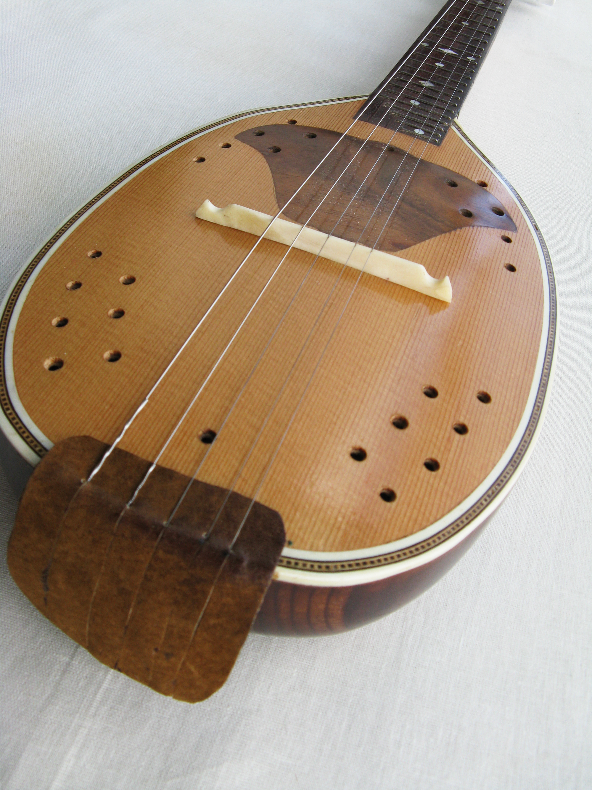 Tambura, a Hungarian instrument used in tambura ensembles. (Hungarian: Prímtambura, Serbian (only Vojvodina) / Croatian: tamburica or bisernica)